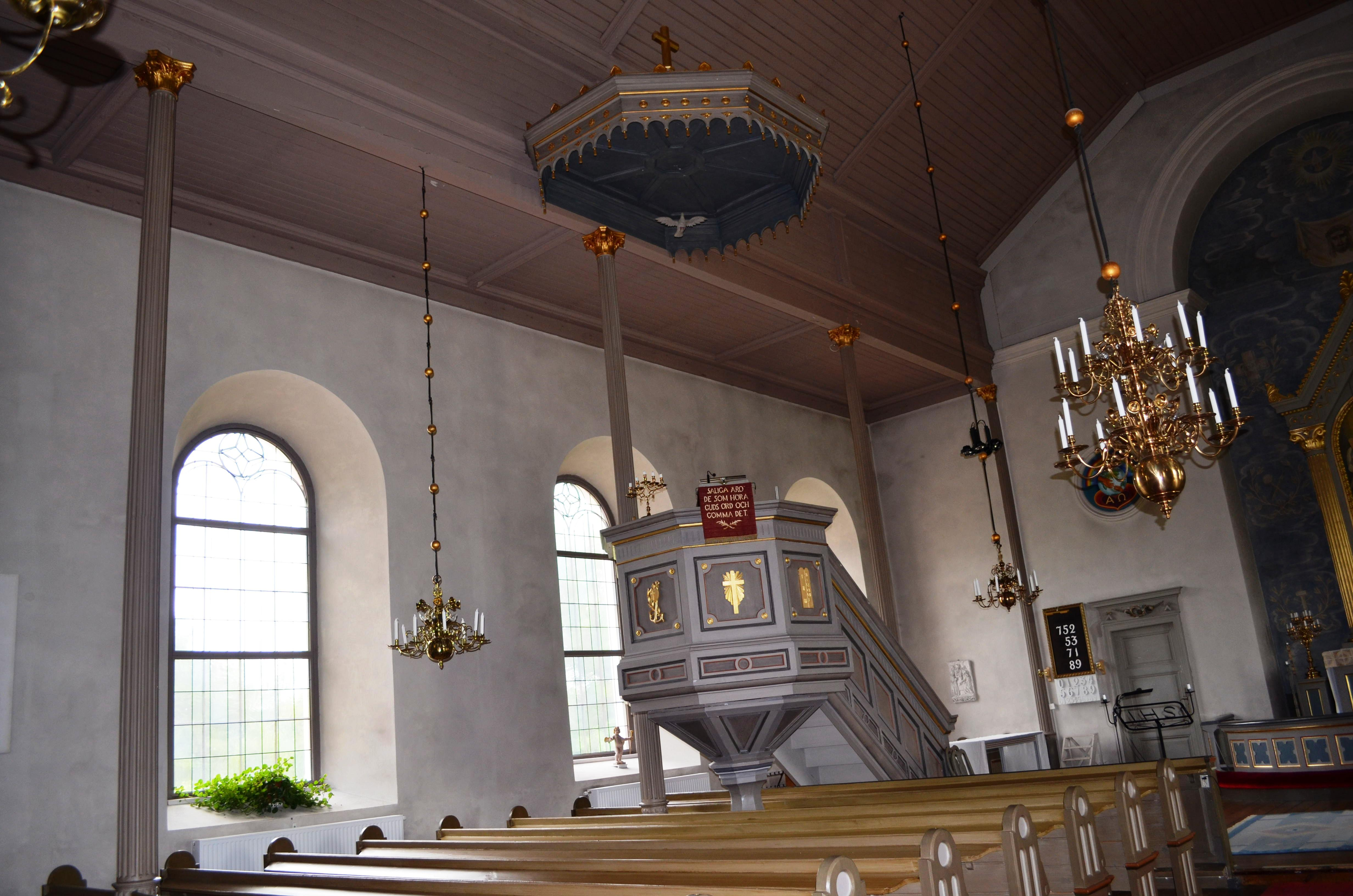 Predikstolen